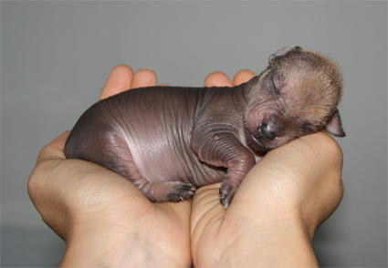 Xolizcuintle recien nacido, se puede apreciar el tamaño del perro comparado con unas manos humanas.